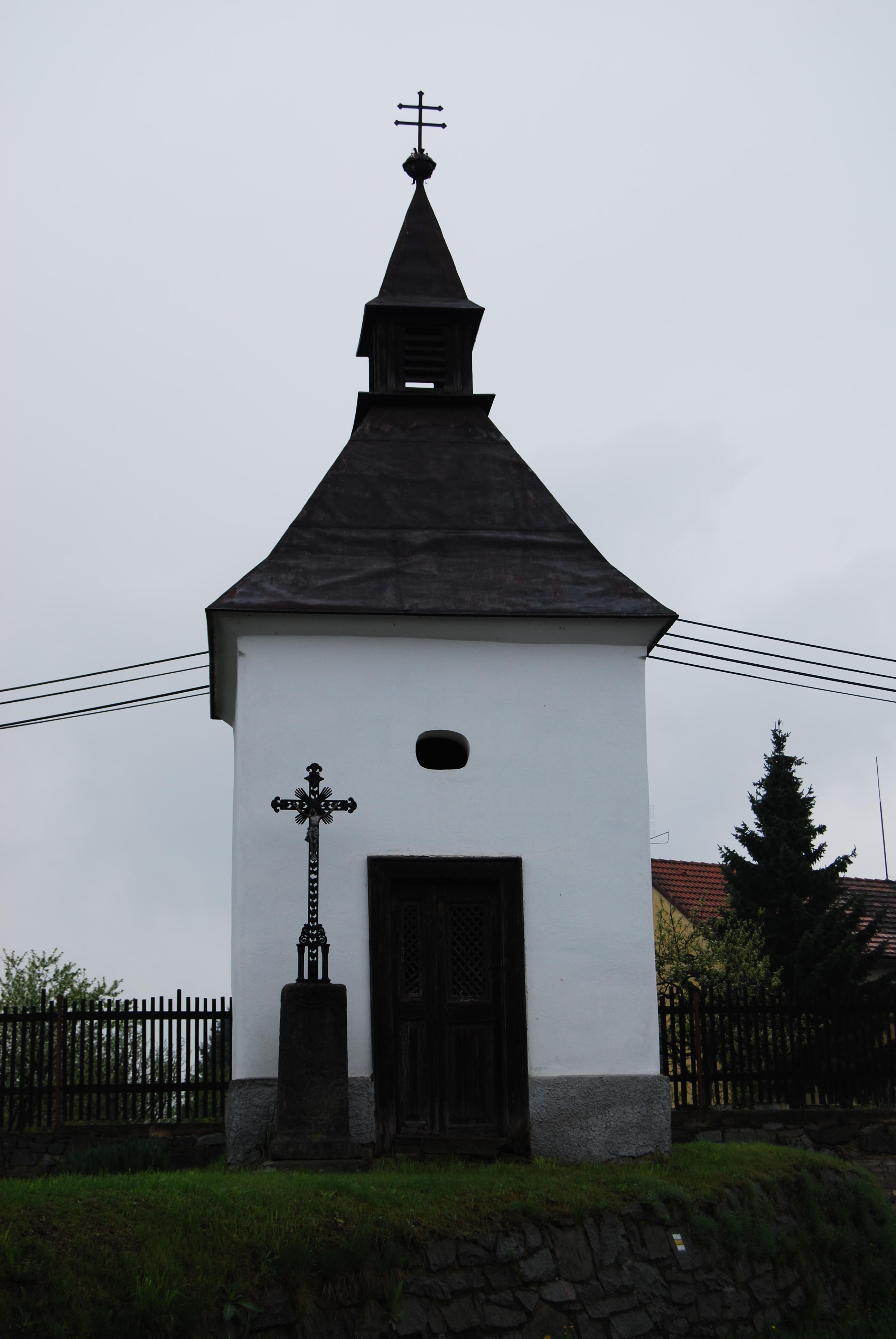 Kaple v obci. Obec Nečín se nachází v okrese Příbram, kraj Středočeský. Česká republika.